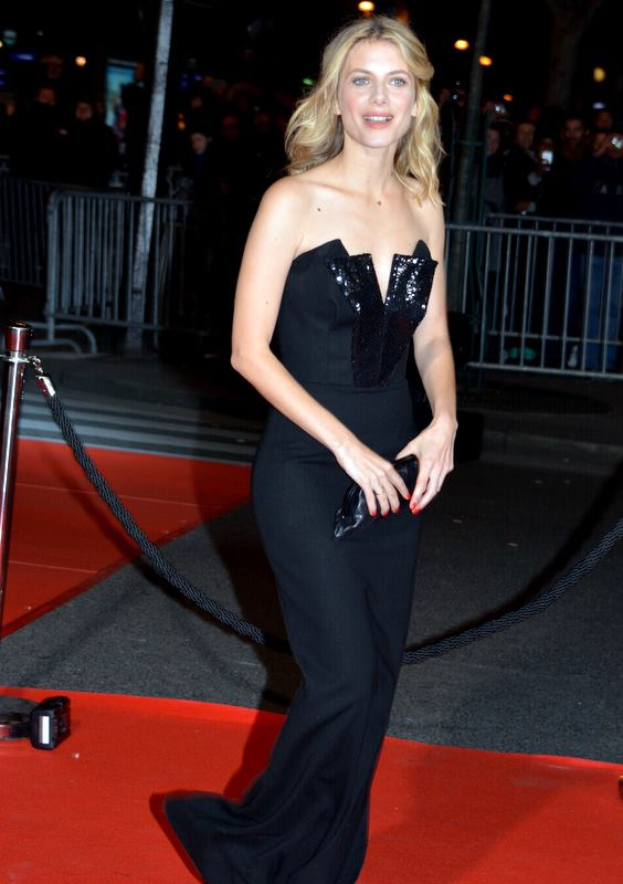 Mélanie Laurent à la cérémonie des César